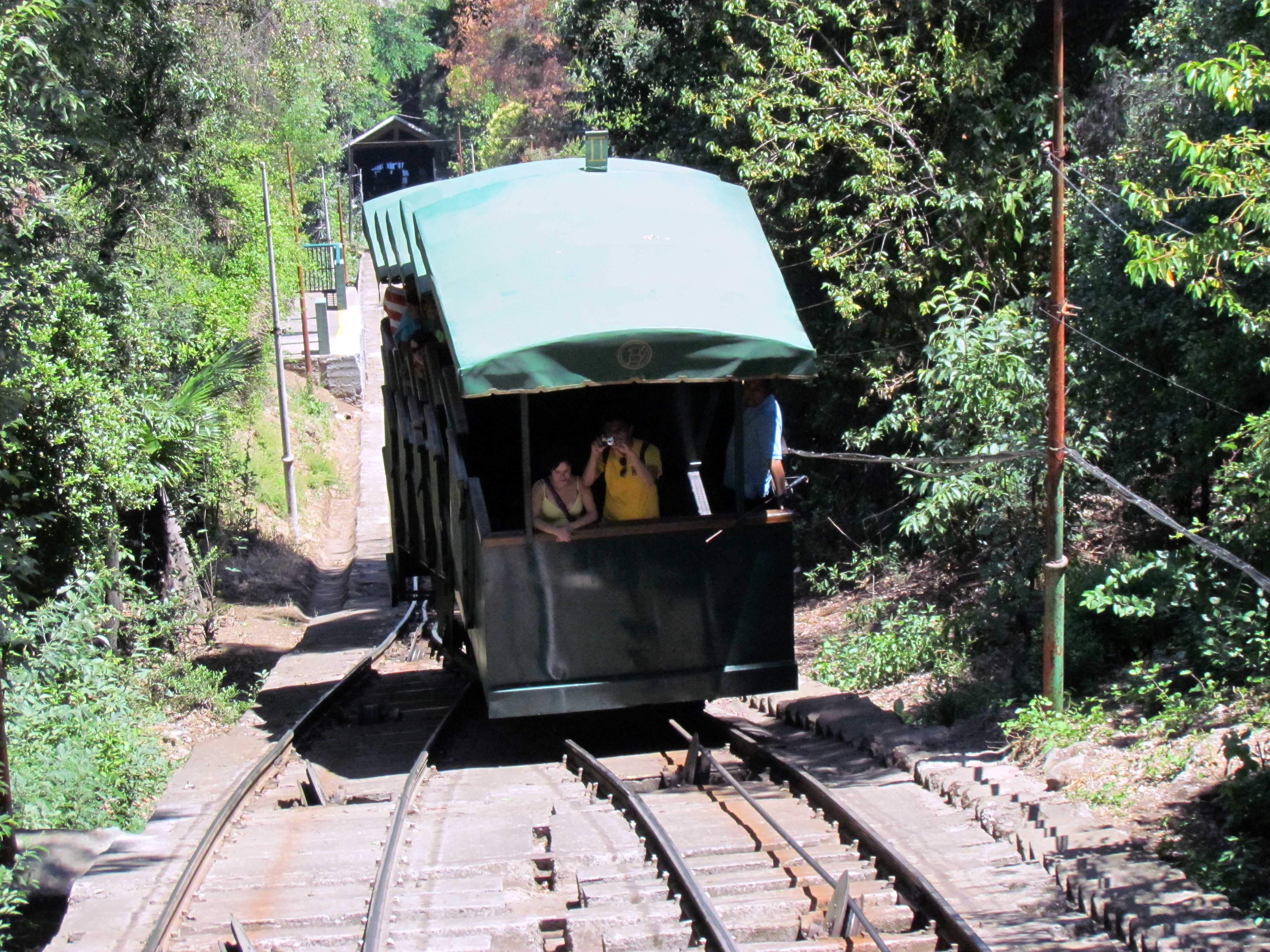 (cc) David Berkowitz